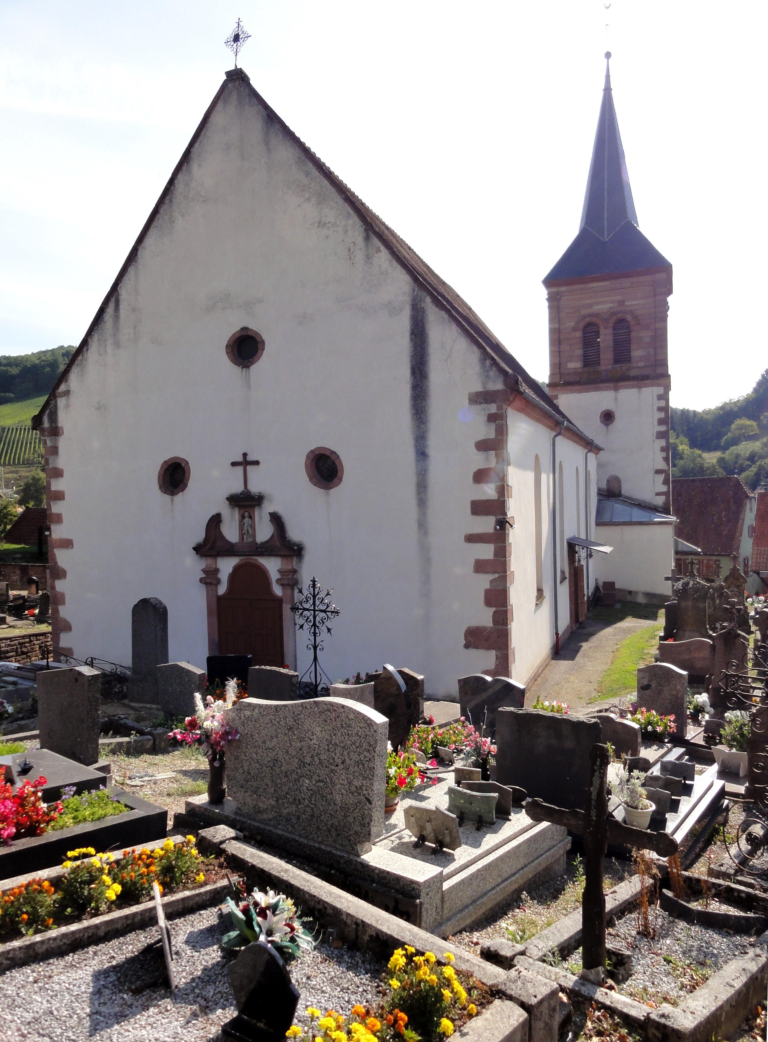 Alsace, Bas-Rhin, Albé, Église Saint-Wendelin (IA67010399).